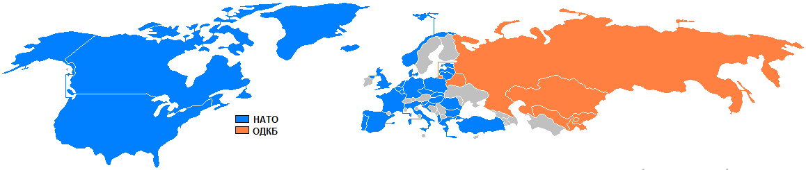 NATO / CSTO members map